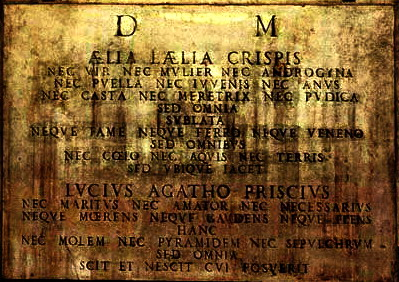 Pierre tombale au Musée de Bologne